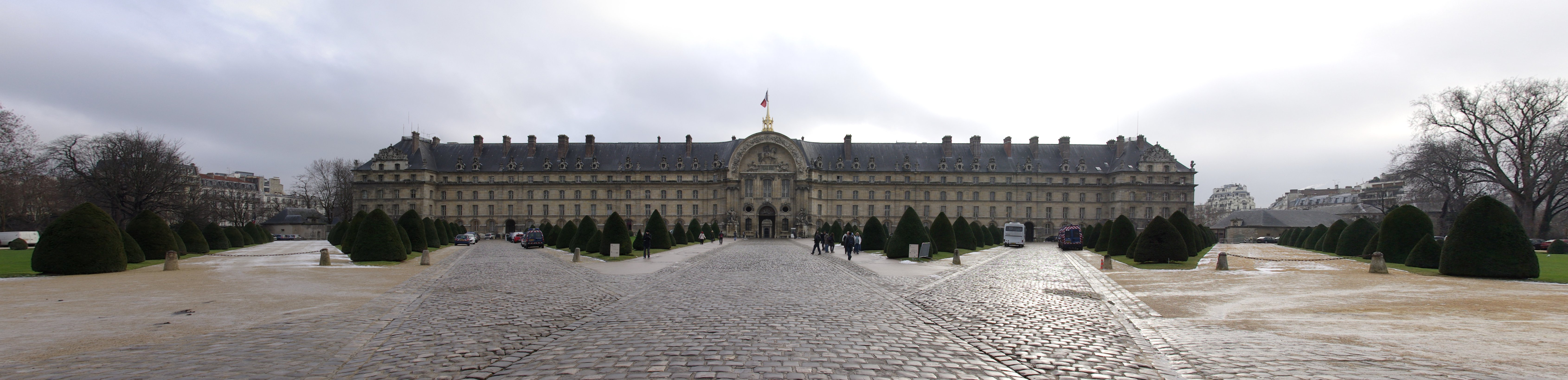 Hôtel des Invalides in Paris